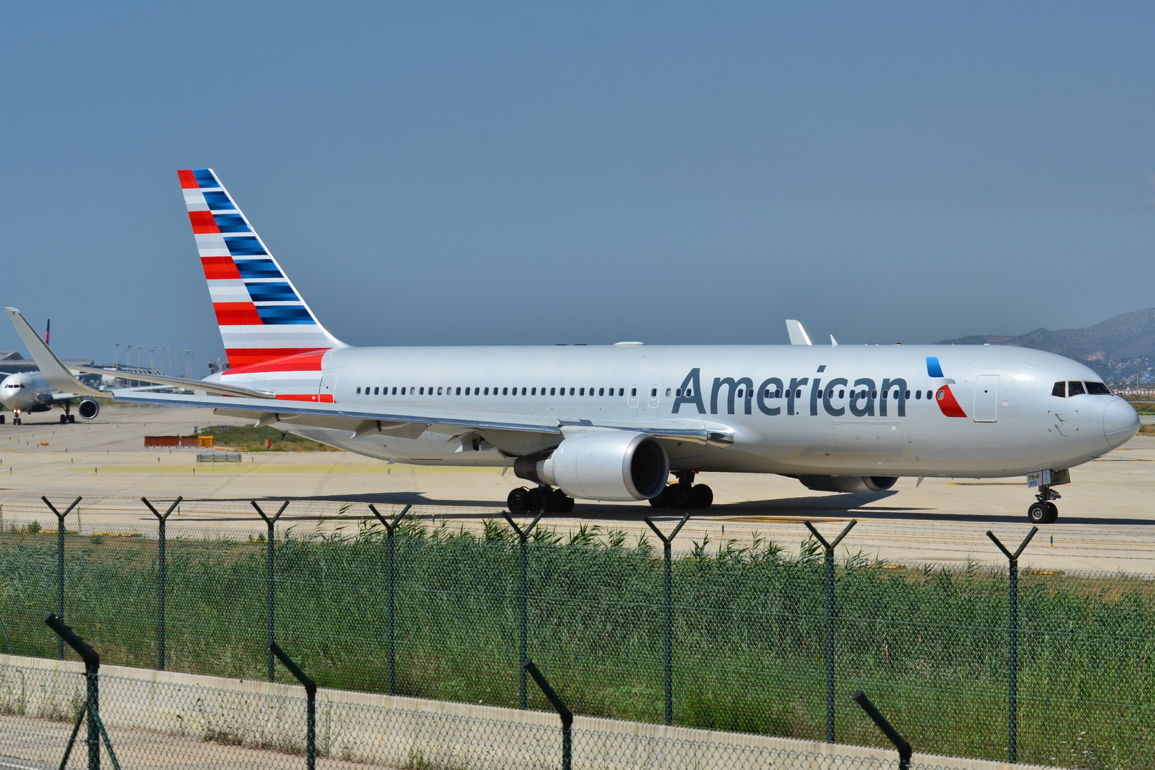 Photo prise à l'aéroport de Barcelone-El Prat (LEBL) en Espagne. Picture take at Barcelona-El Prat Airport (LEBL) in Spain.